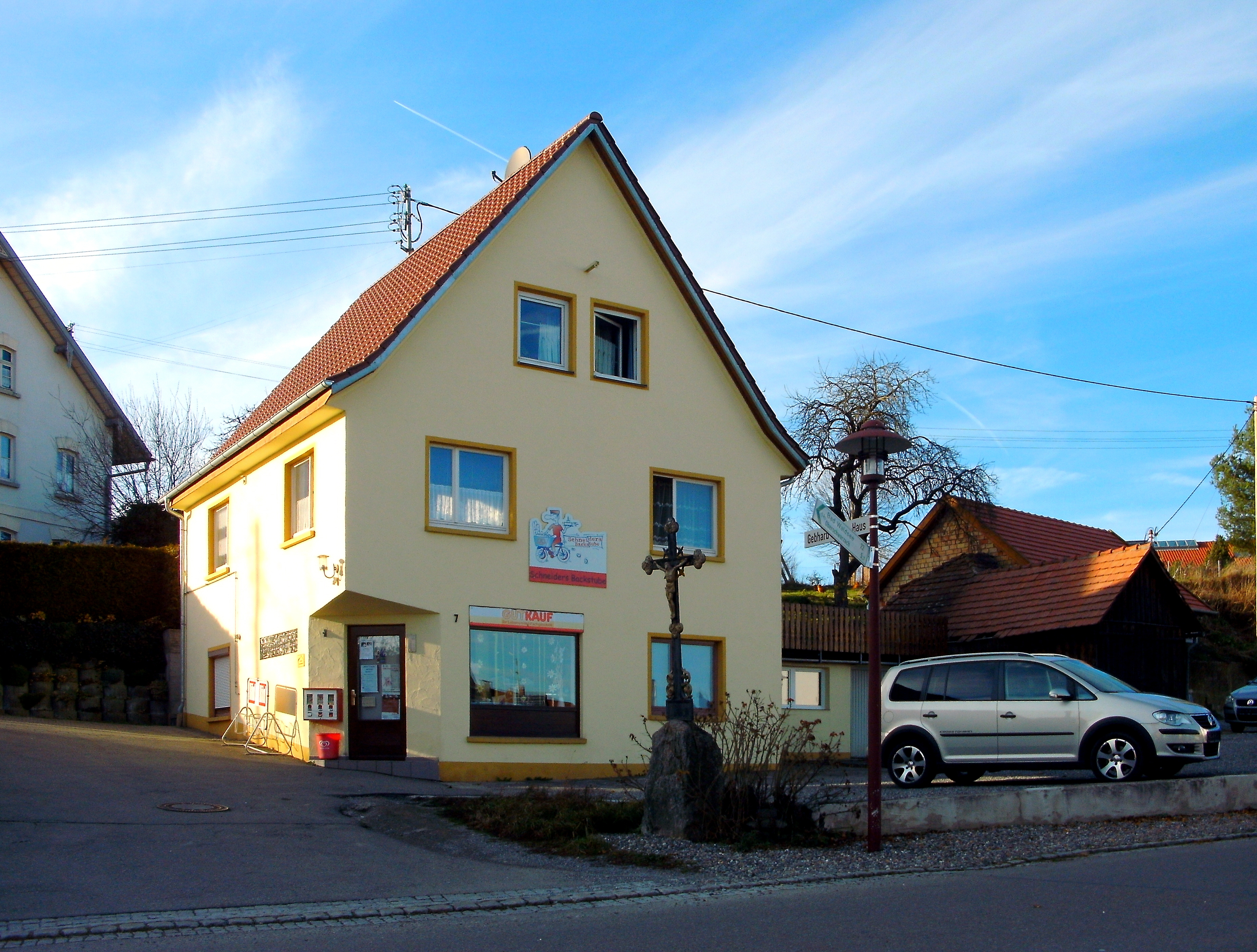 Geburtshaus Gebhard Müller in Füramoos (Gemeinde Eberhardzell); im Vordergrund ein Feldkreuz